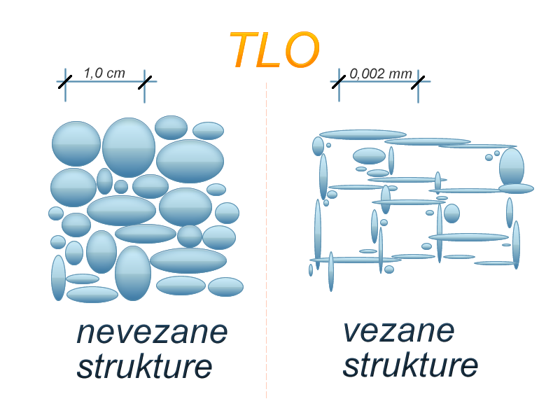 Struktura tla - vezana, nevezana